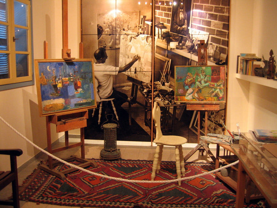 Nahum Gutman's studio